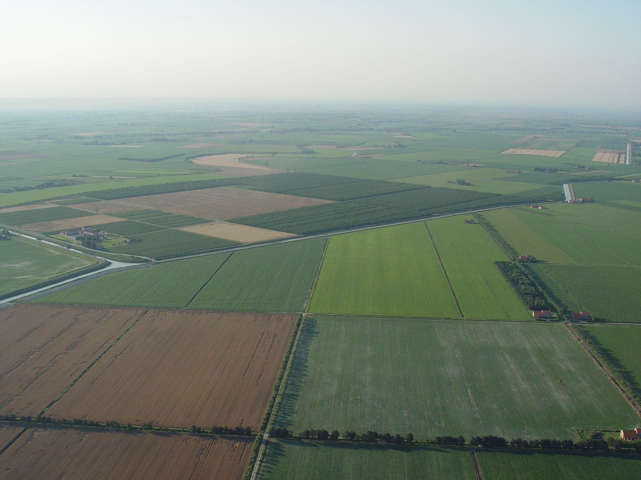 Foto della campagna di Eraclea scattata da mongolfiera a 100 metri di altezza. Si nota il corso del canale Ongaro.